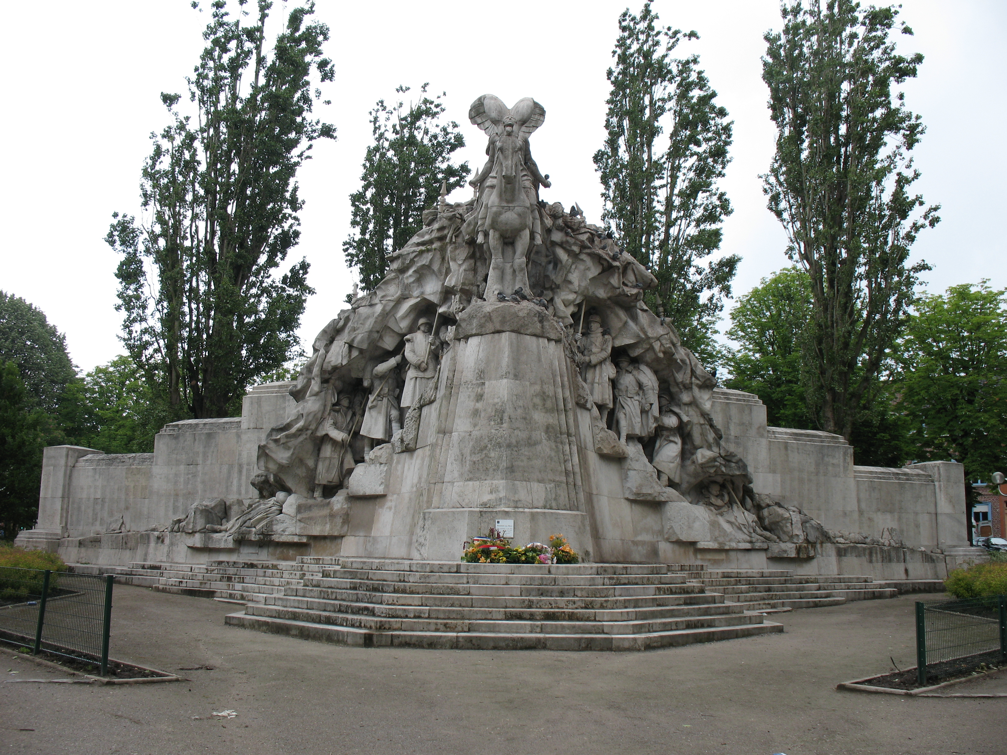 The Place de la Victoire in TourcoingLa Place de la Victoire à TourcoingDer Place de la Victoire in Tourcoing